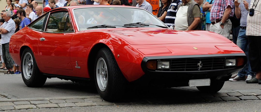 Ferrari 356 GTC/4 in Ferrari-Rot